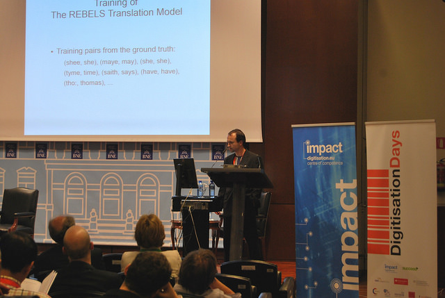 Celebración de los 'Digitisation Days'.